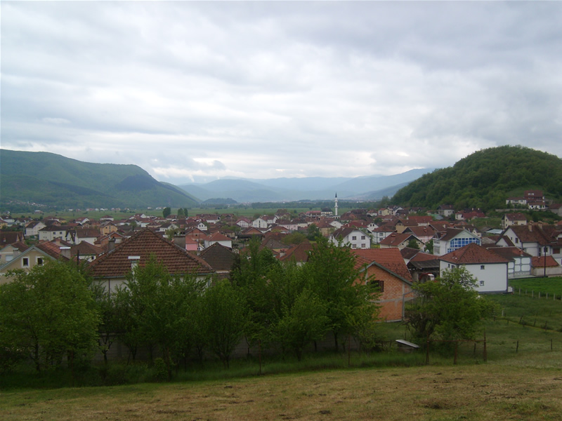 Aussicht auf Cërvica.